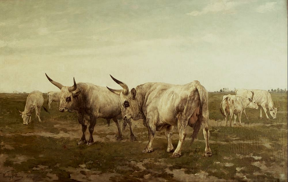 Párbajra készülő bikák. Vastagh Géza (1866-1919) festménye.